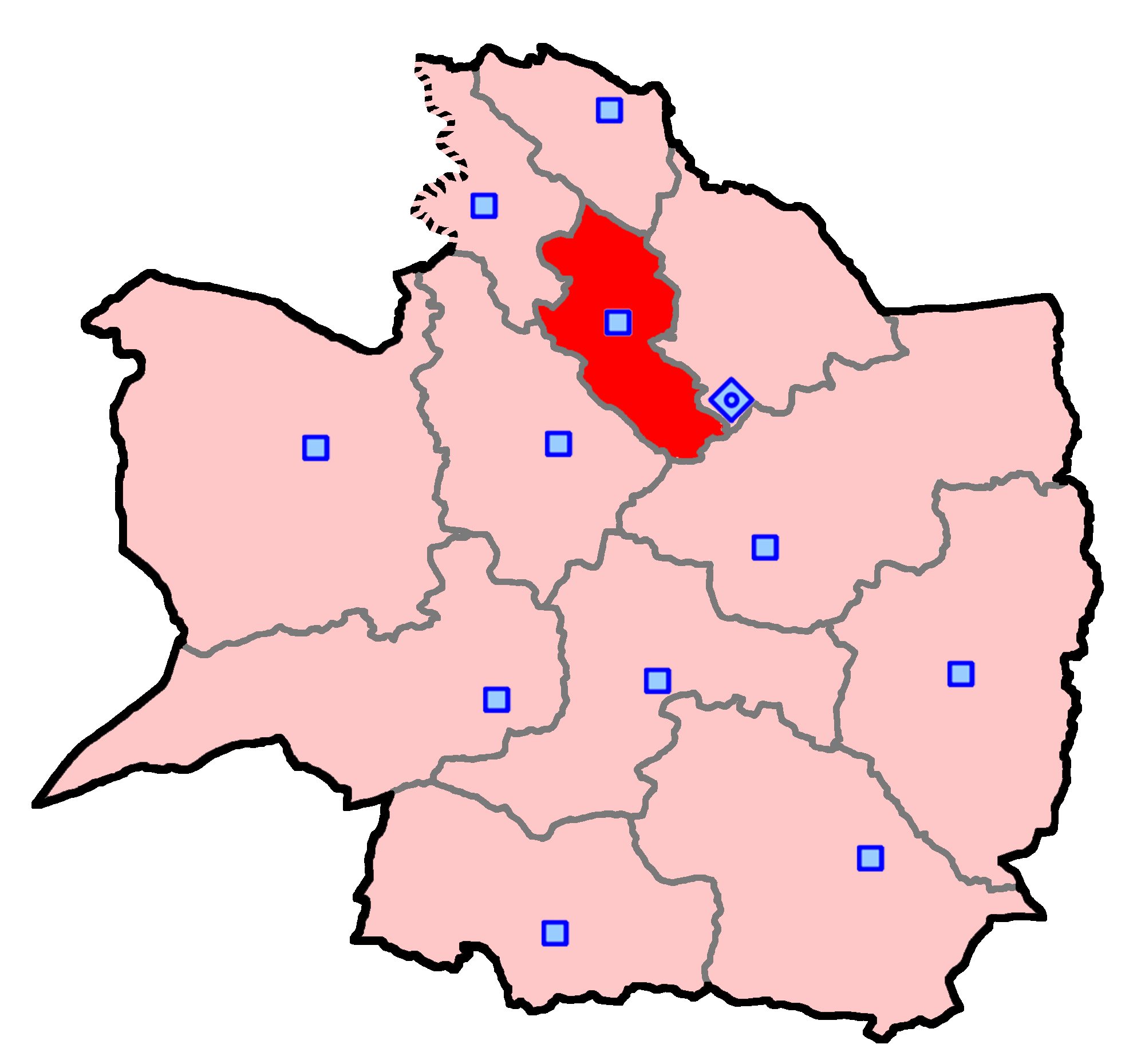 حوزهٔ انتخاباتی چناران برای انتخابات مجلس شورای اسلامی